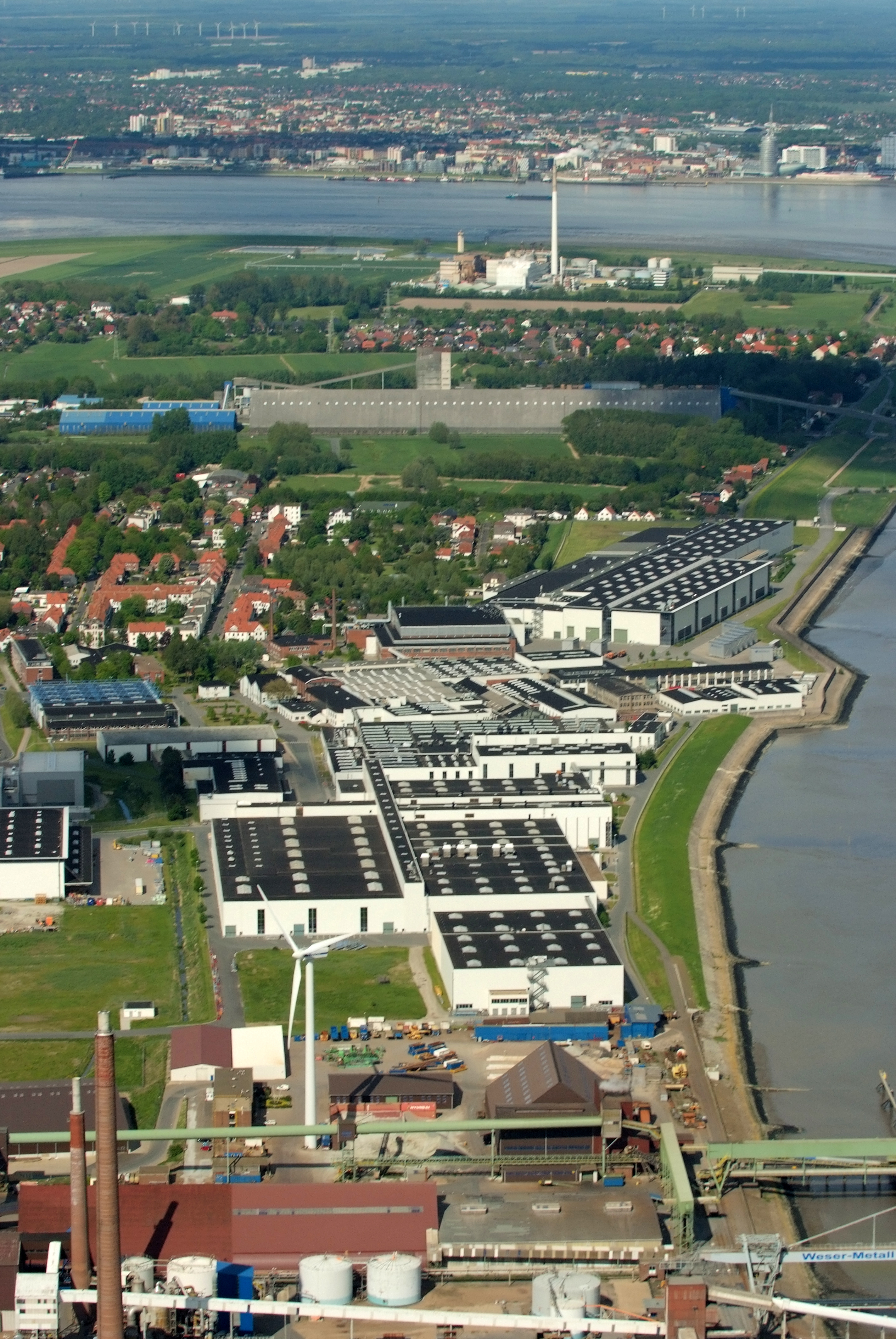 Werksgelände des Flugzeugherstellers Premium Aerotec in Nordenham Fotoflug vom Flugplatz Nordholz-Spieka über Bremerhaven, Wilhelmshaven und die Ostfriesischen Inseln bis Borkum